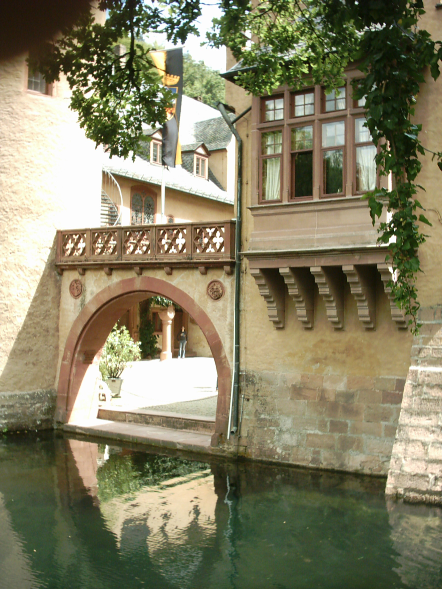 Schloss Mespelbrunn im Spessart, Westflügel Fotograf: presse03, selbst fotografiert 2005 Lizenz: GNU-FDL